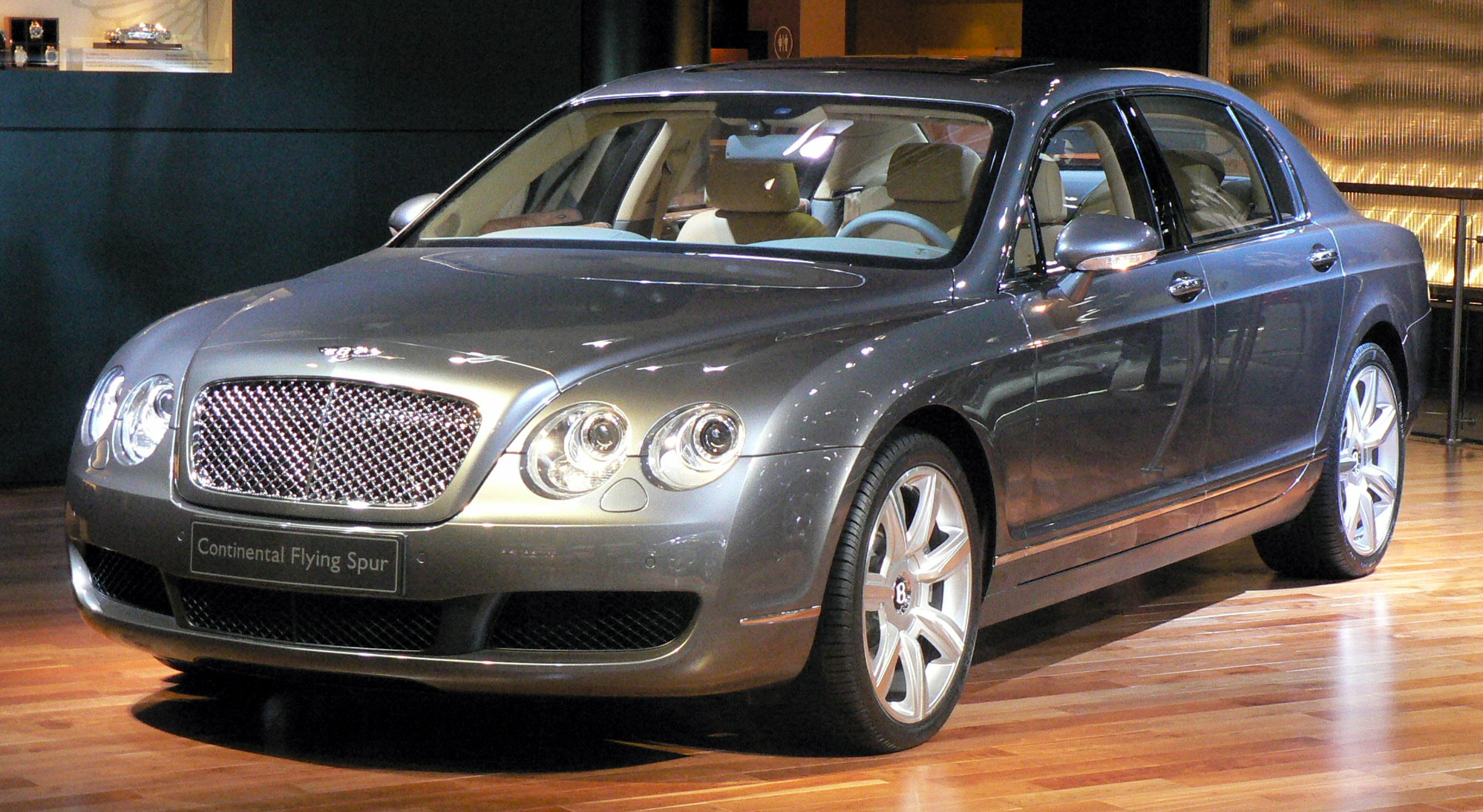 Mondial de l'automobile, Paris 2006